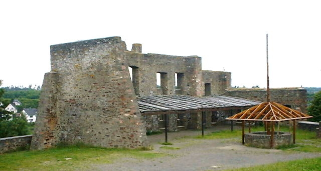 Innenansicht der Burgruine bei Ulmen 1999